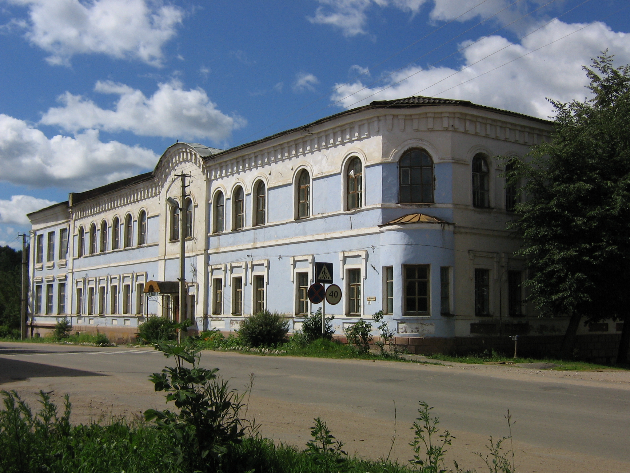 Гимназия женская (Тверская область, Белый, улица Ленина, 14)